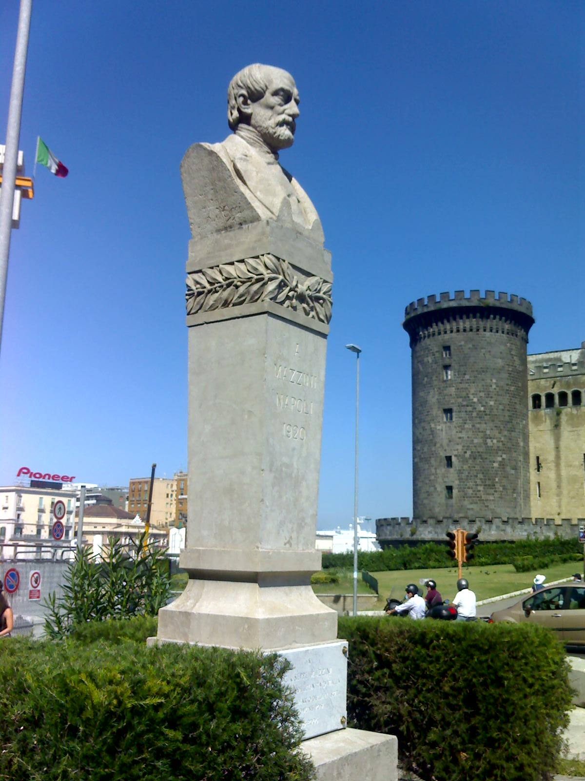 Busto di Giuseppe Mazzini del 1920 posto in Piazza Municipio. A Napoli.